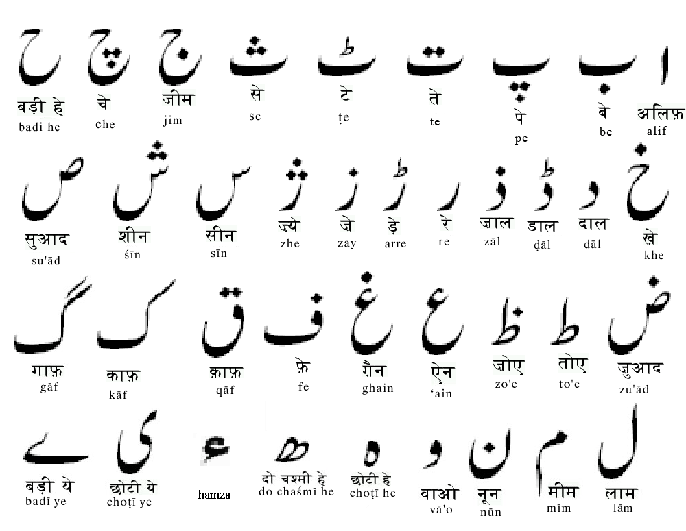 Urdu alphabets complied and labeled by Girishاردو حروف تہجی کی تالیف اور ناموں کی فراہمی گیرش کی اپلوڈجانب سے کی گئی ہے .